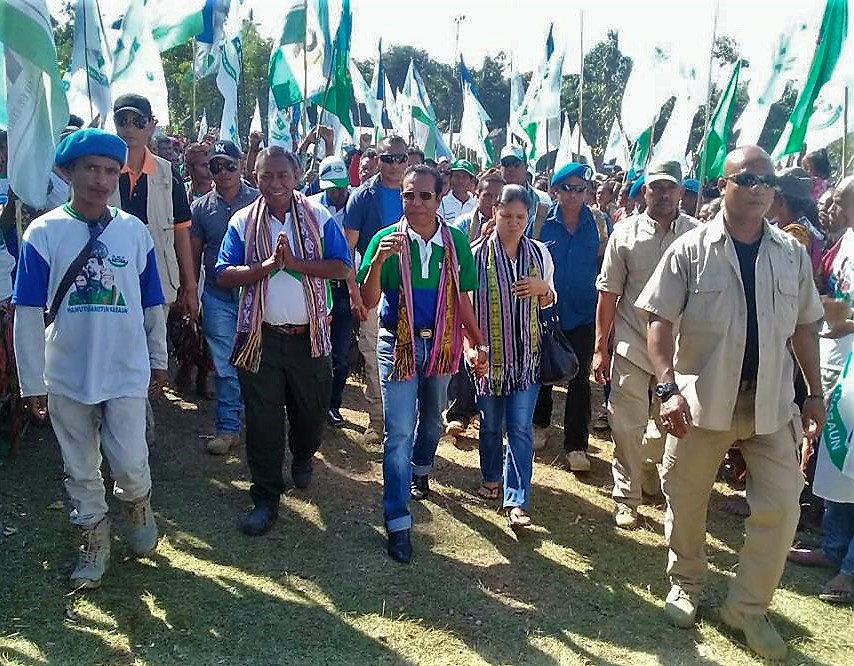 Taur Matan Ruak und Isabel da Costa Ferreira auf einer Wahlkampfveranstaltung der AMP in Oesilo, Oecusse, Osttimor